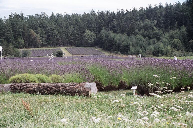 Kultivita lavenda kampo en insulo San Juan